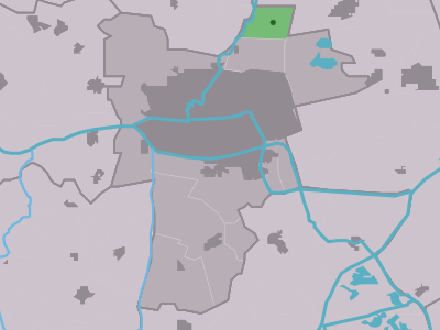 Kaartsje fan himrik fan Miedum